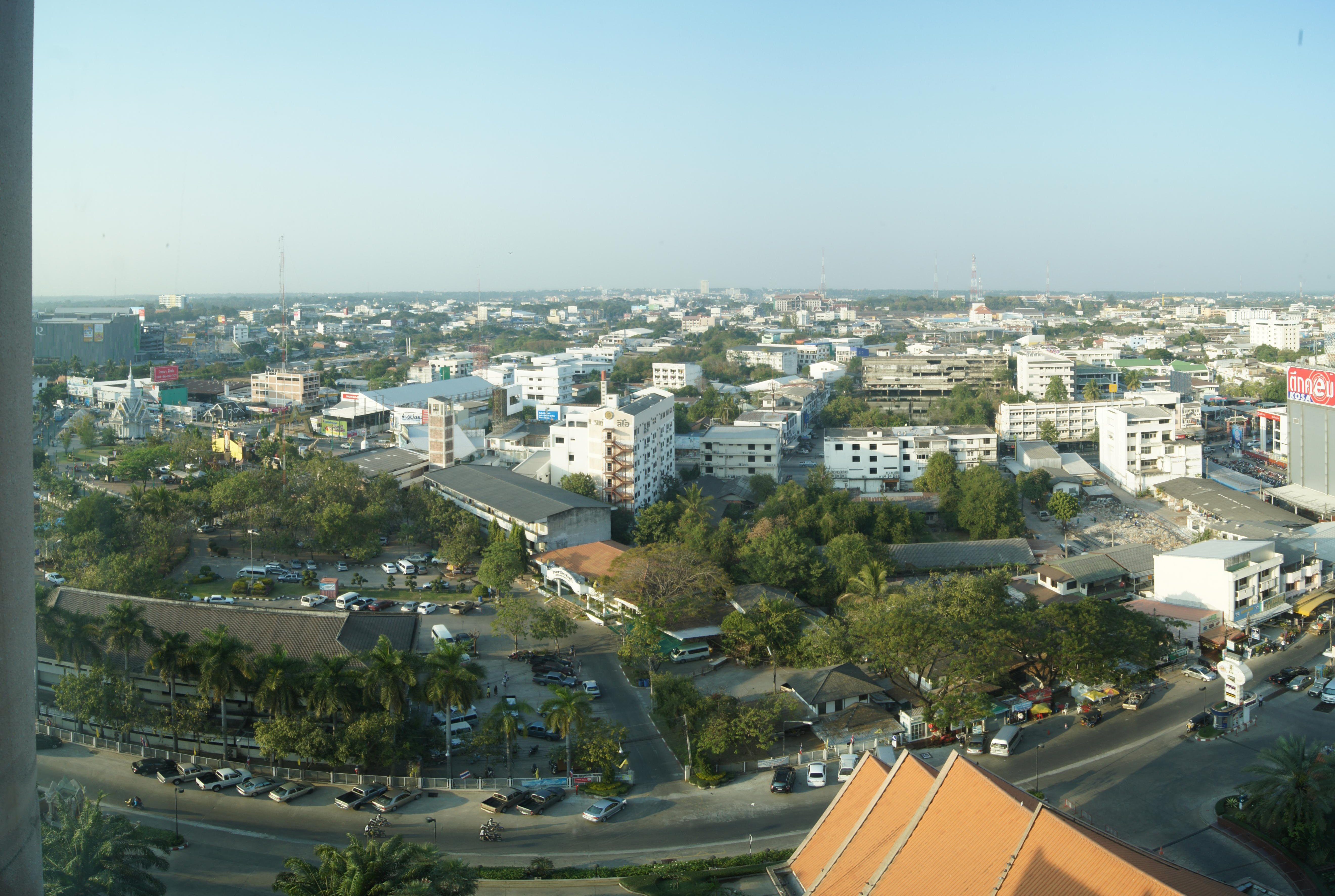 קון קאן